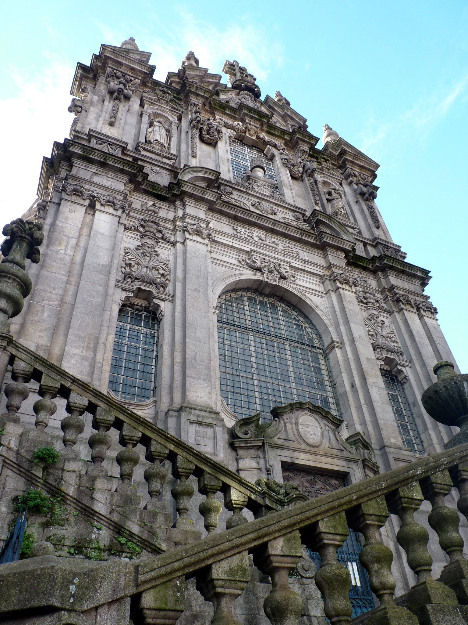 Igreja dos Clérigos, Porto, Portugal